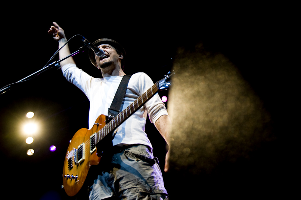 Jason Mraz at Campo Pequeno, March 19, 2009